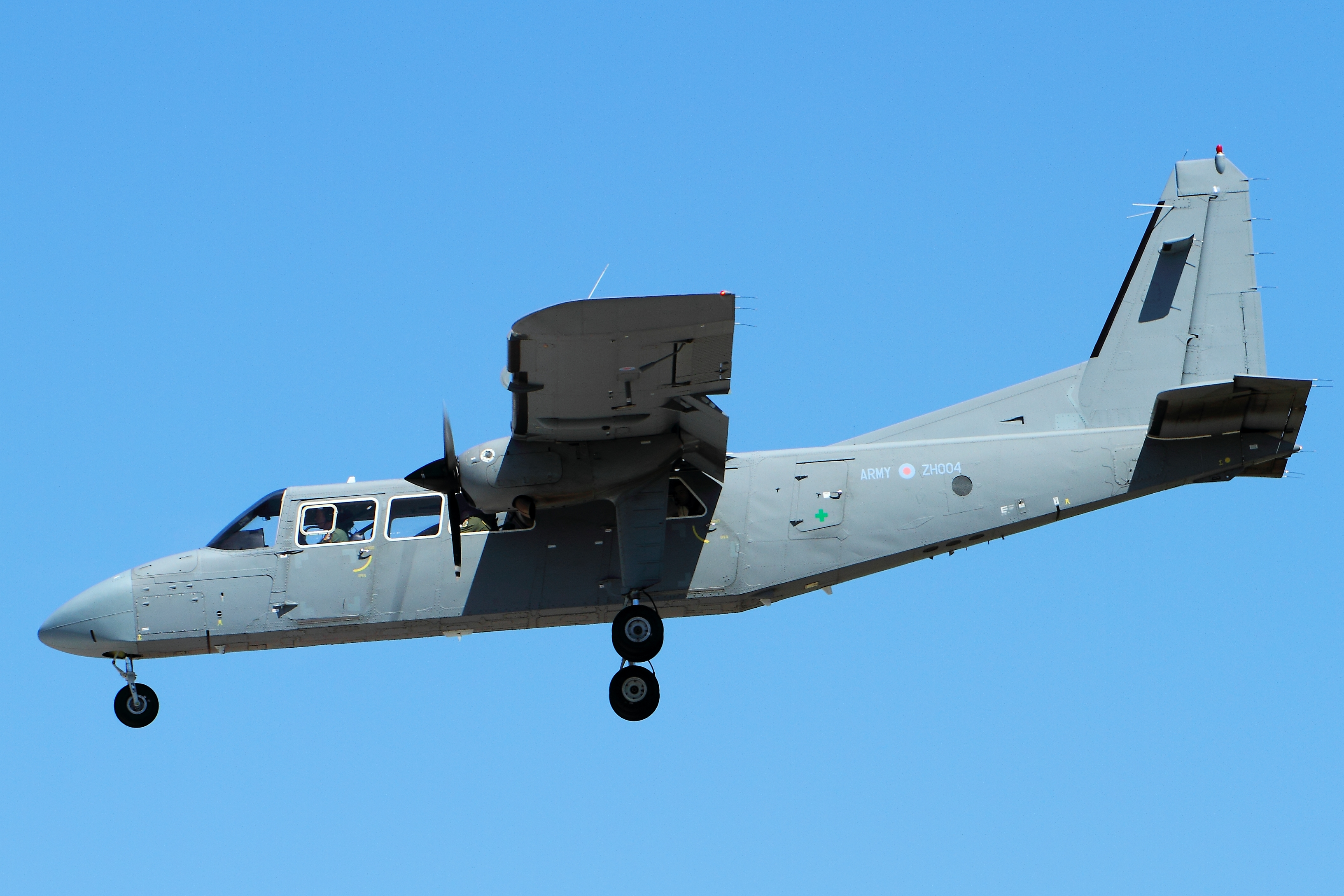 BN-2T Islander - RIAT 2014